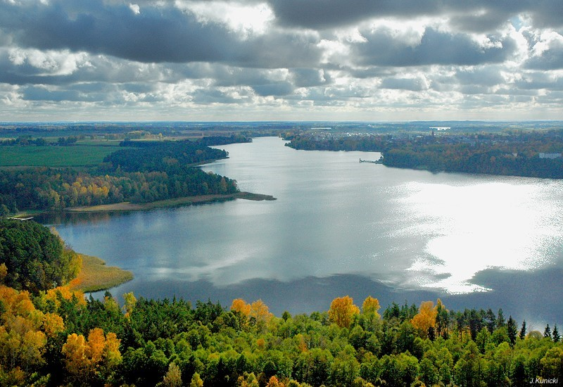 Olecko Jezioro Oleckie Wielkie